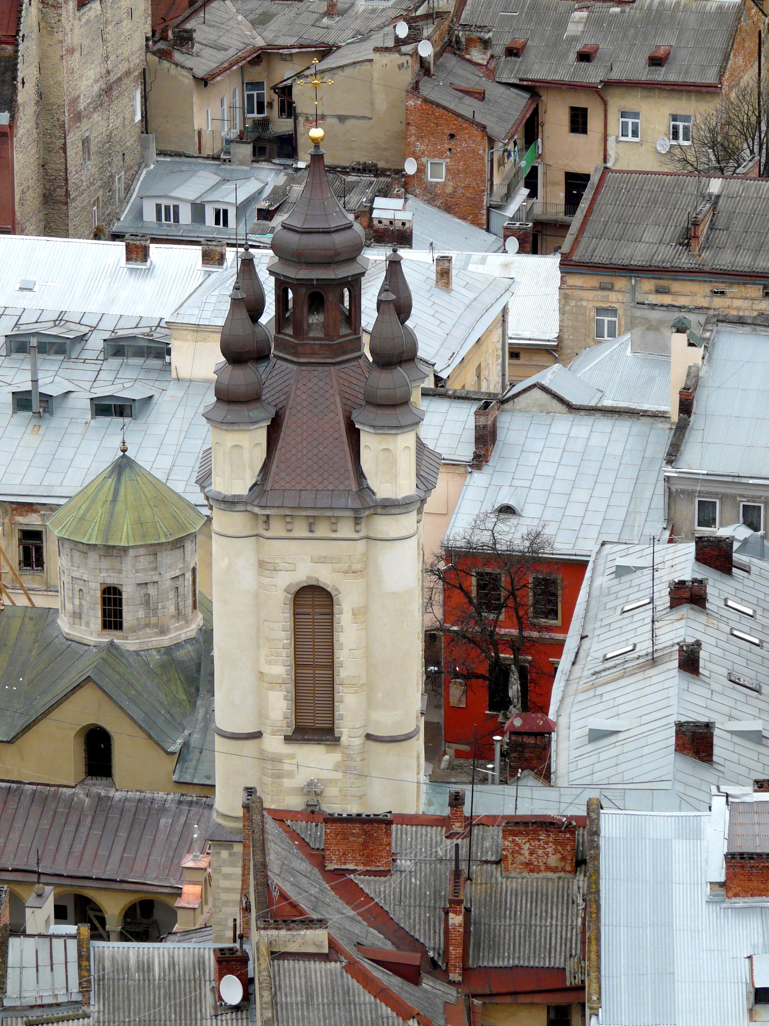 дзвіниця Вірменського собору, Львів, Вірменська, 7